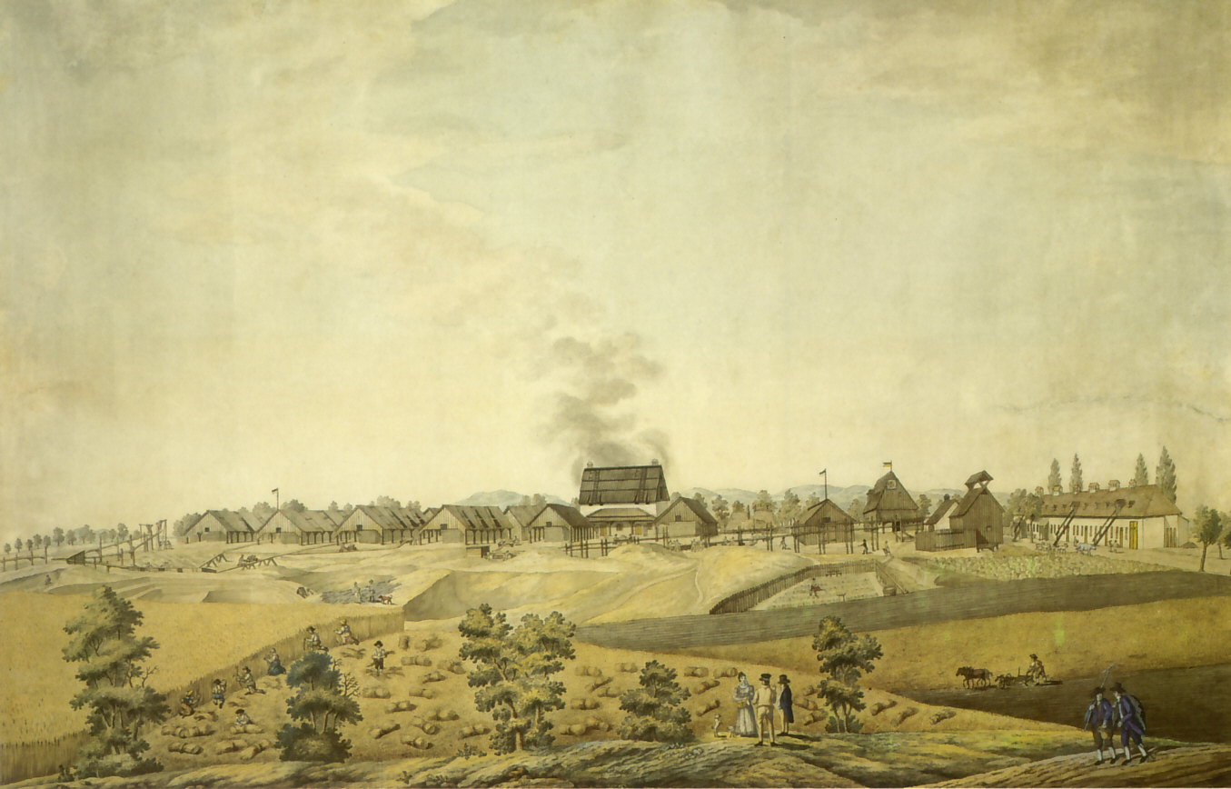 Fortifikations-Ziegelschlag am Wienerberg (um 1815), Aquarell, 47,9 x 71,8 cm, Wien Museum Inv. Nr. 95.779